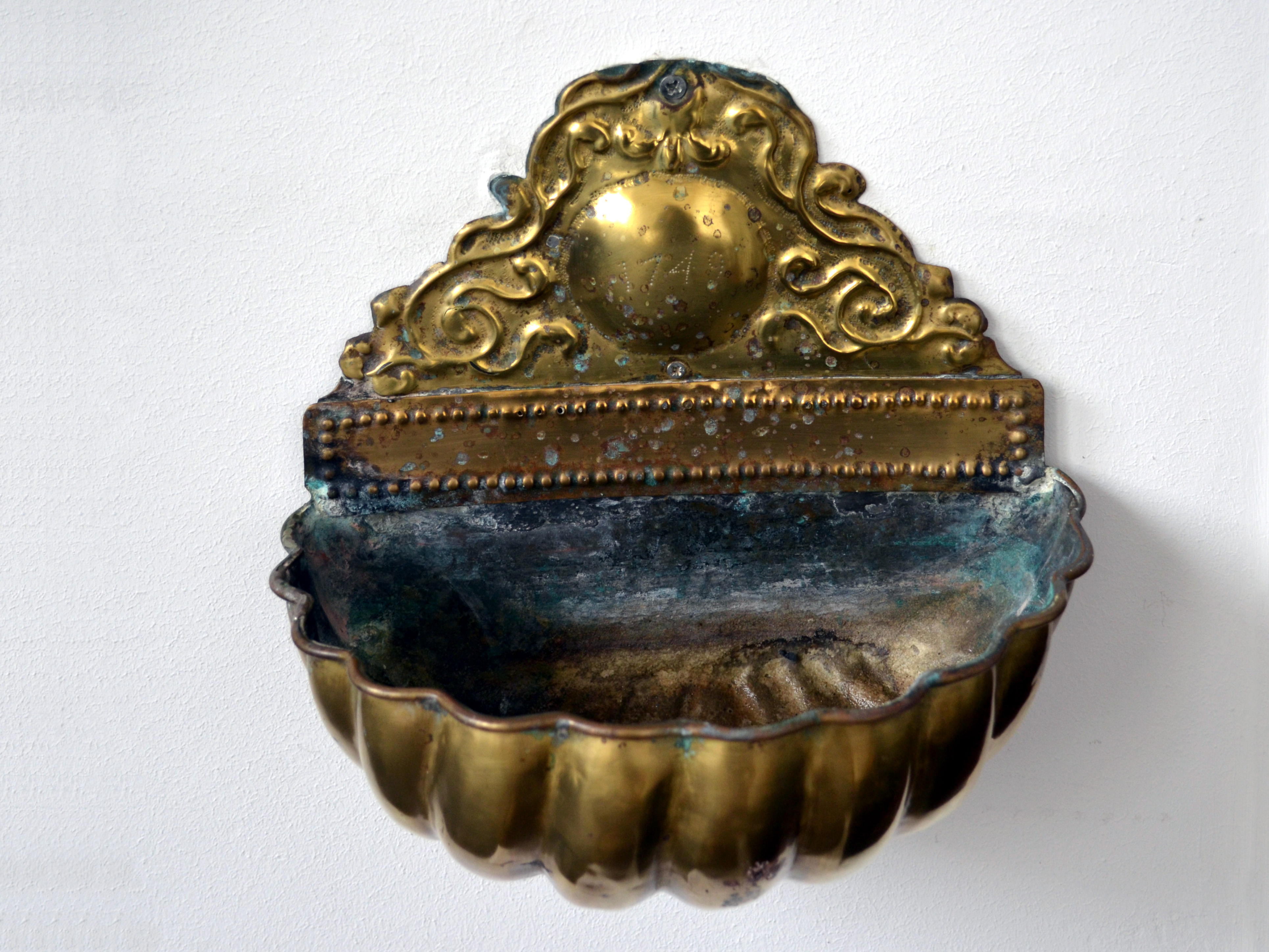 Sankt Johannes-Baptist Enthauptungskapelle in Eupen-Nispert, Weihwasserbecken